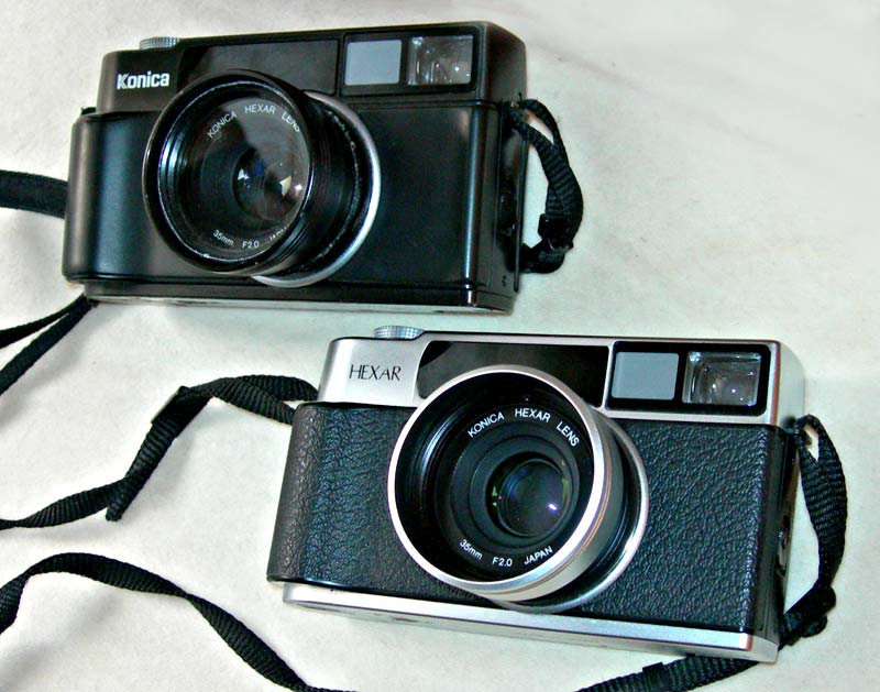 To Konica Hexar filmkameraer.